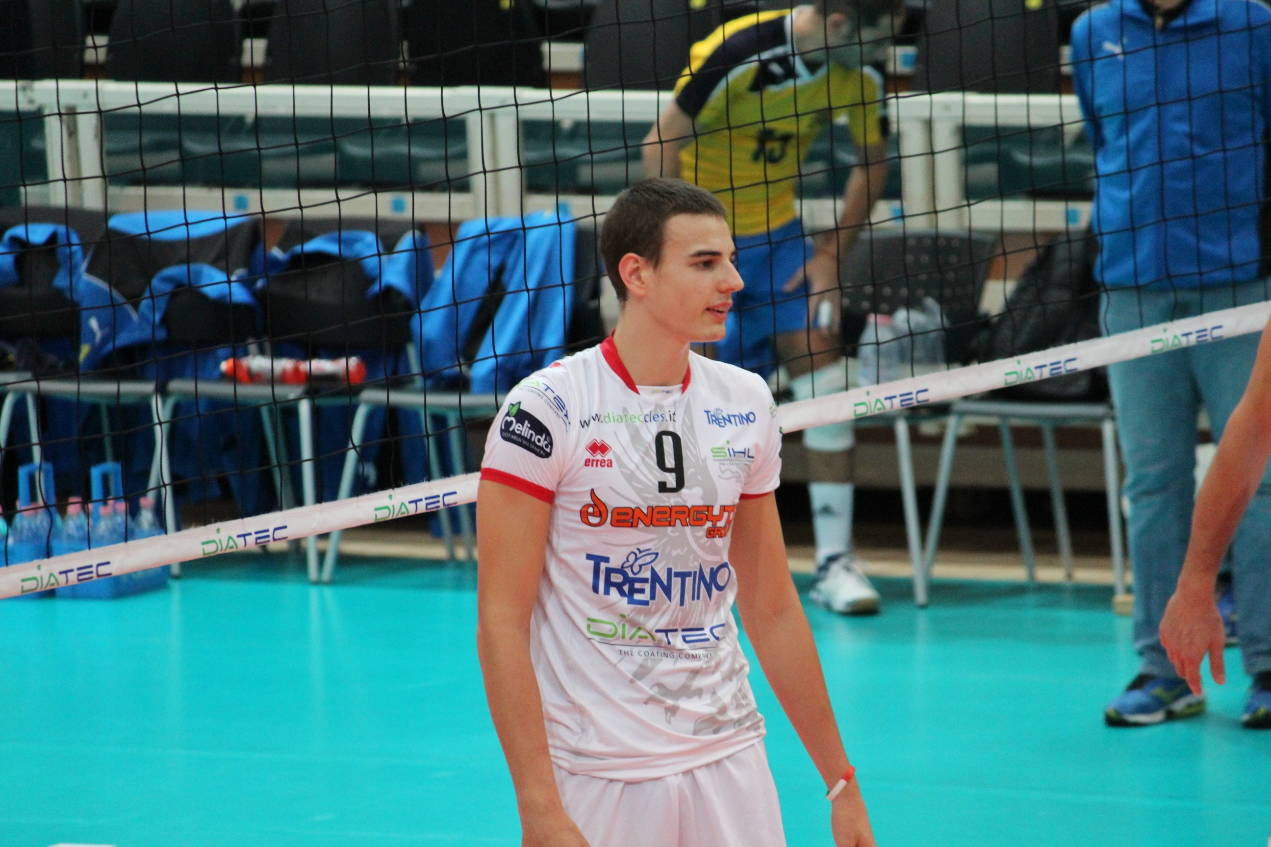 Simone Giannelli durante un riscaldamento pre-partita